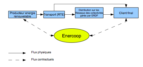 schéma explicatif de la fourniture d'electricité par enercoop